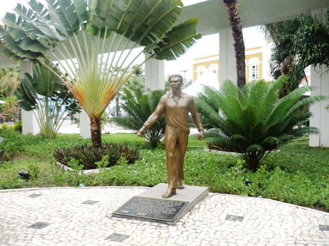 Foto Karol Lima MC Online